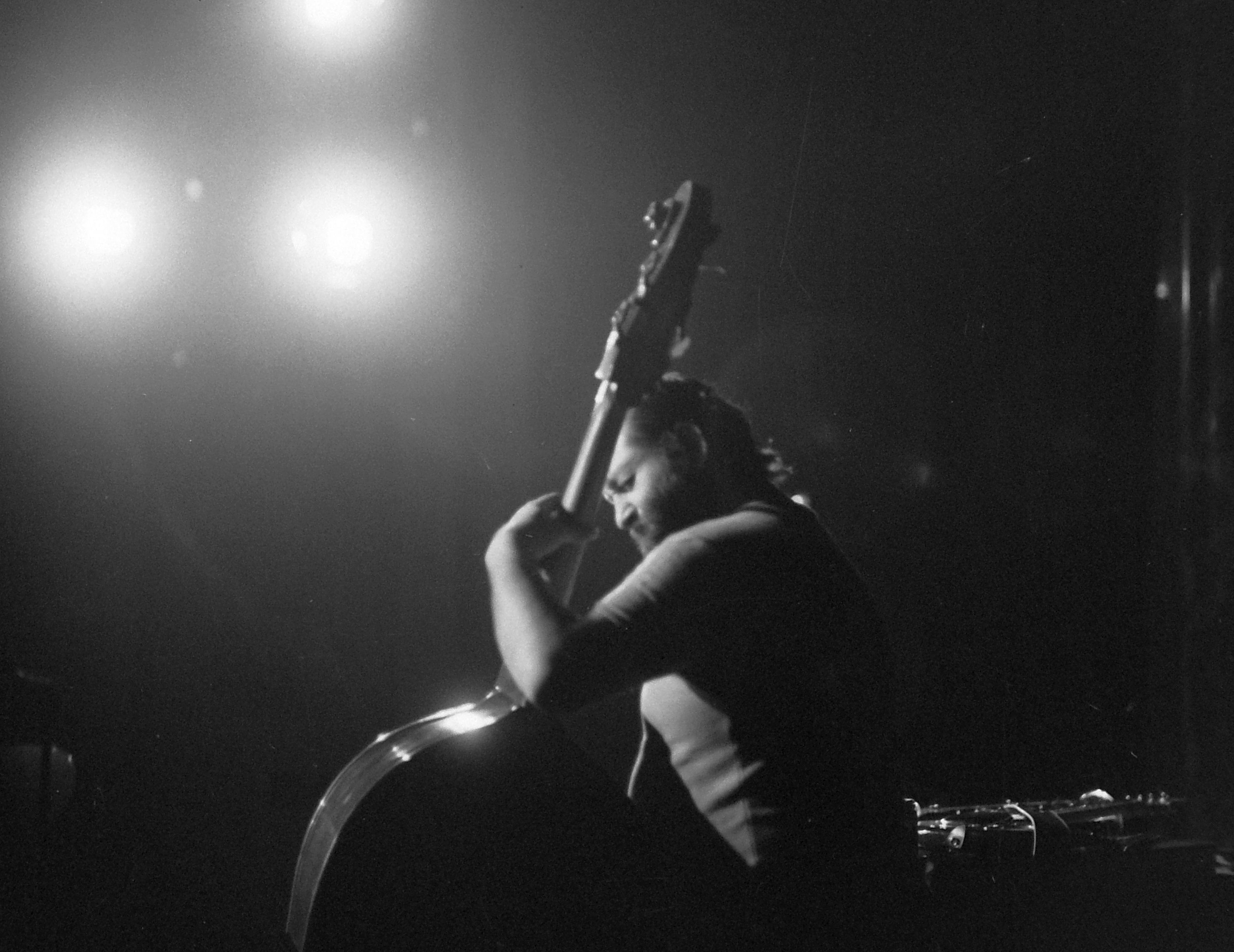 Pege Aladár nagybőgőművész. Location: Hungary, Budapest V. Tags: celebrity, Budapest, musical instrument, double bass Title: Pege Aladár nagybőgőművész.